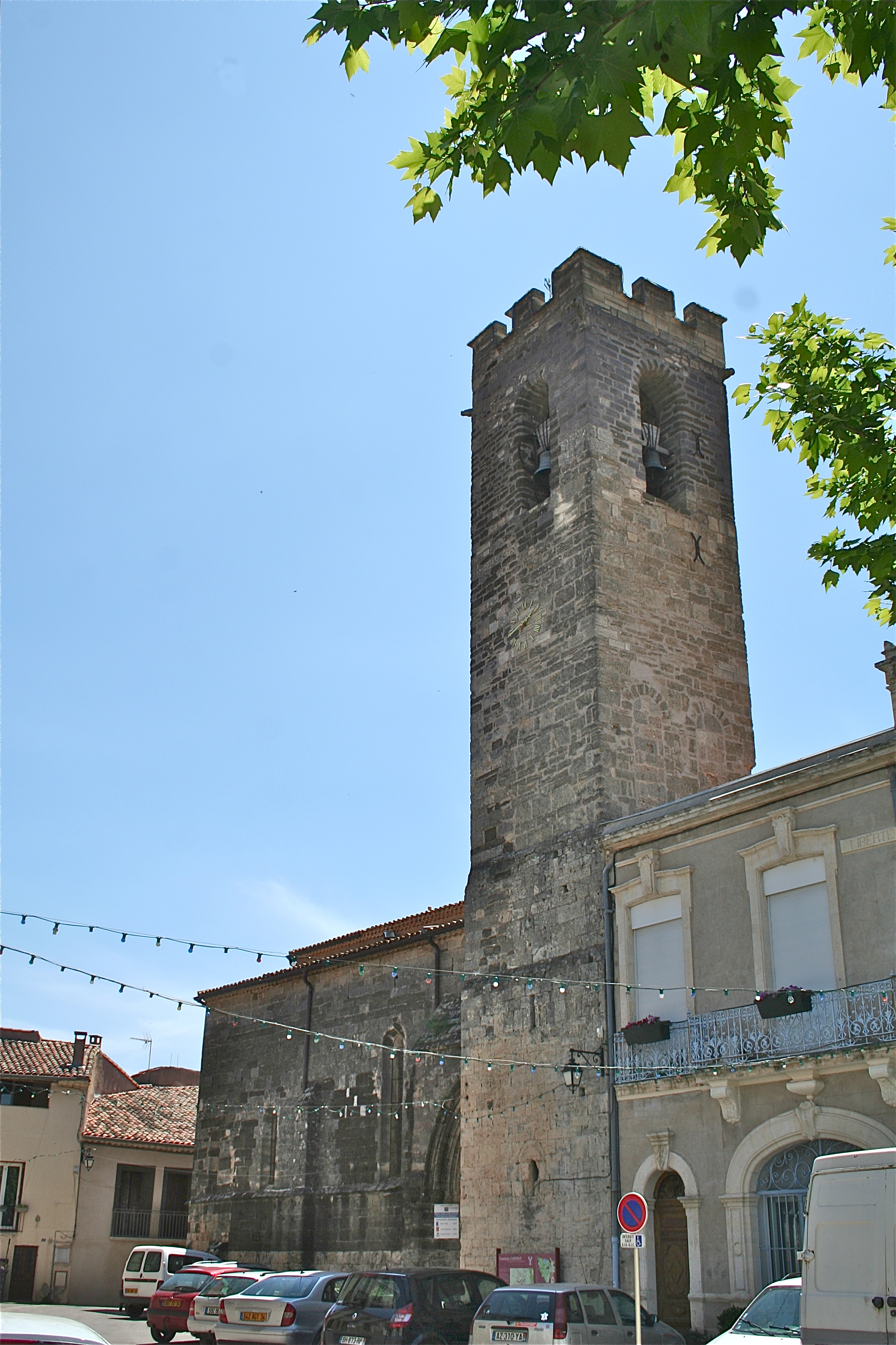 Aspiran (Hérault, France) - église Saint-Julien - clocher